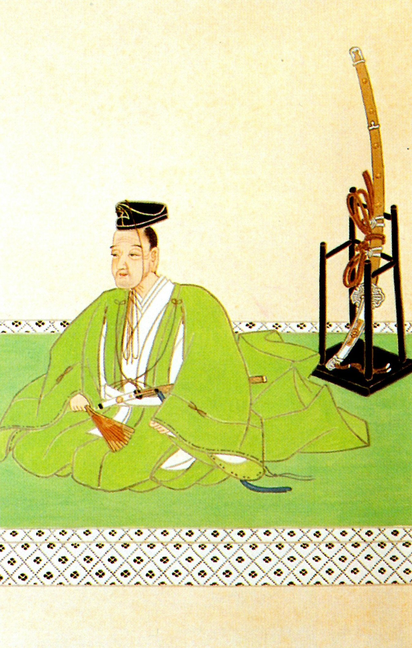 戸田氏庸の肖像。